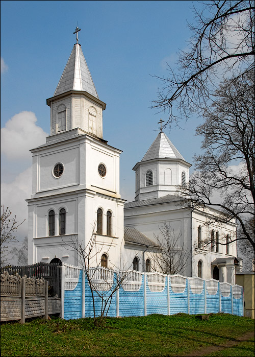 Лагойск. Царква Св. Мікалая